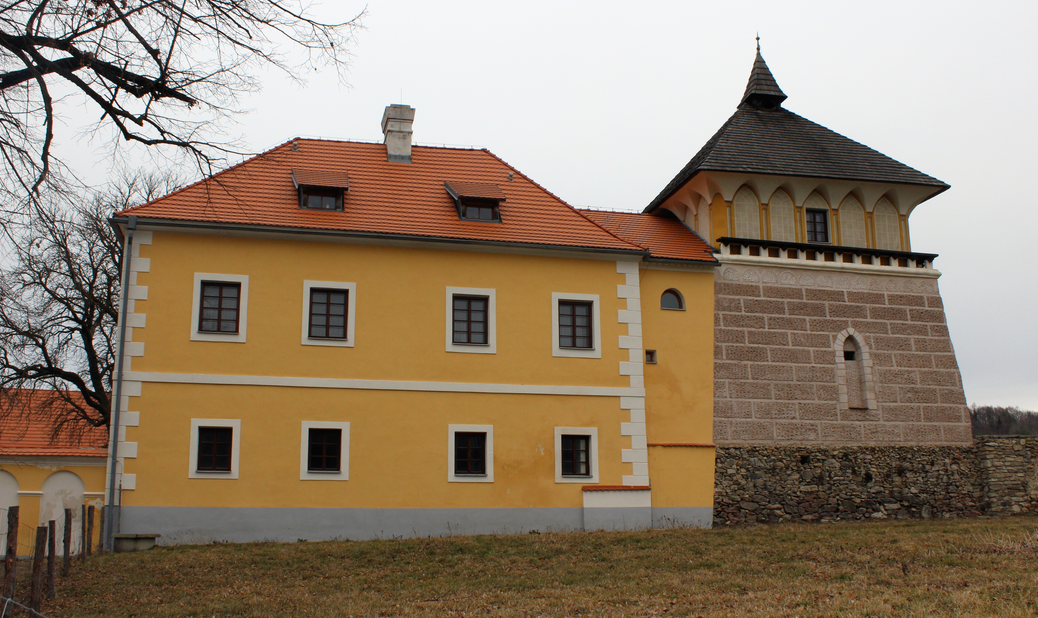 Tvrz v osadě Vrchotice